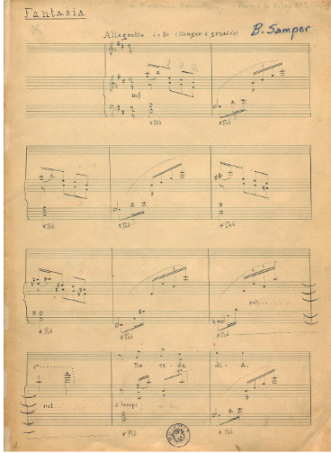 Figura 2: Fantasia, amb lletra de Josep M. Casas­Homs. Font: Fons Conxita Badia, BC, top. M 459233a.